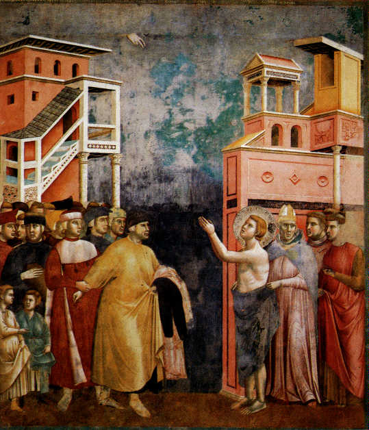 een fresco uit de cyclus van Giotto di Bondone in de bovenkerk in Assisi